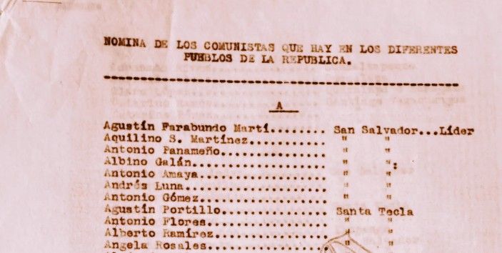 lista que continene el nombre de Farabundo marti como lider de la insurrecion.